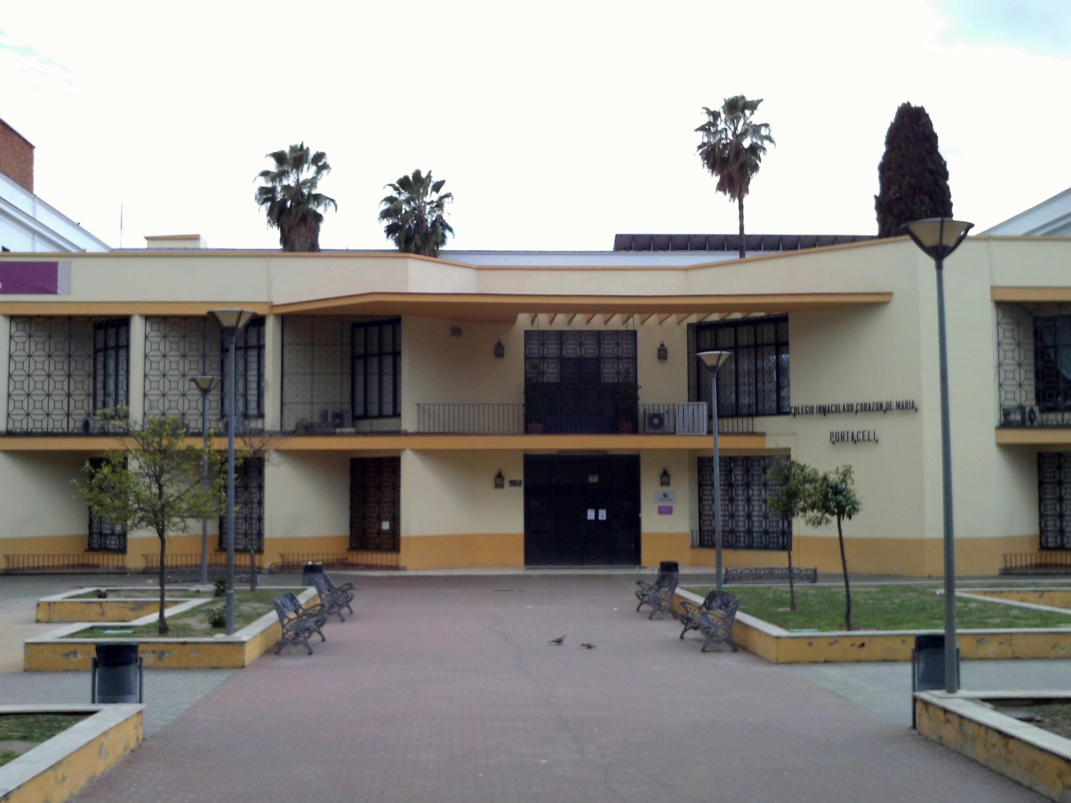 Colegio Inmaculado Corazón de María Portaceli. Sevilla, Andalucía, España.